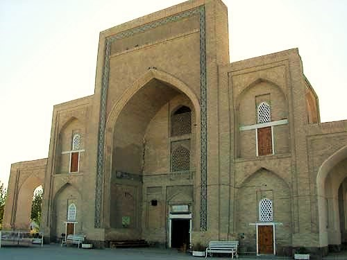 Бухара. Ханака Файзабад